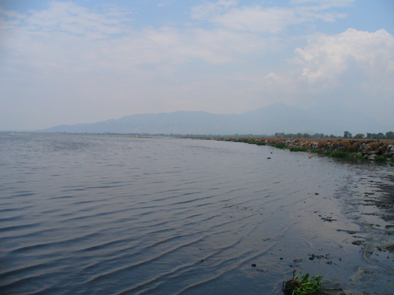 Laguna de teuchitlàn, Jalisco, Mèxico.